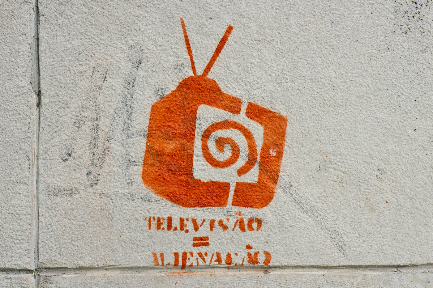 Stencils - Lisbon